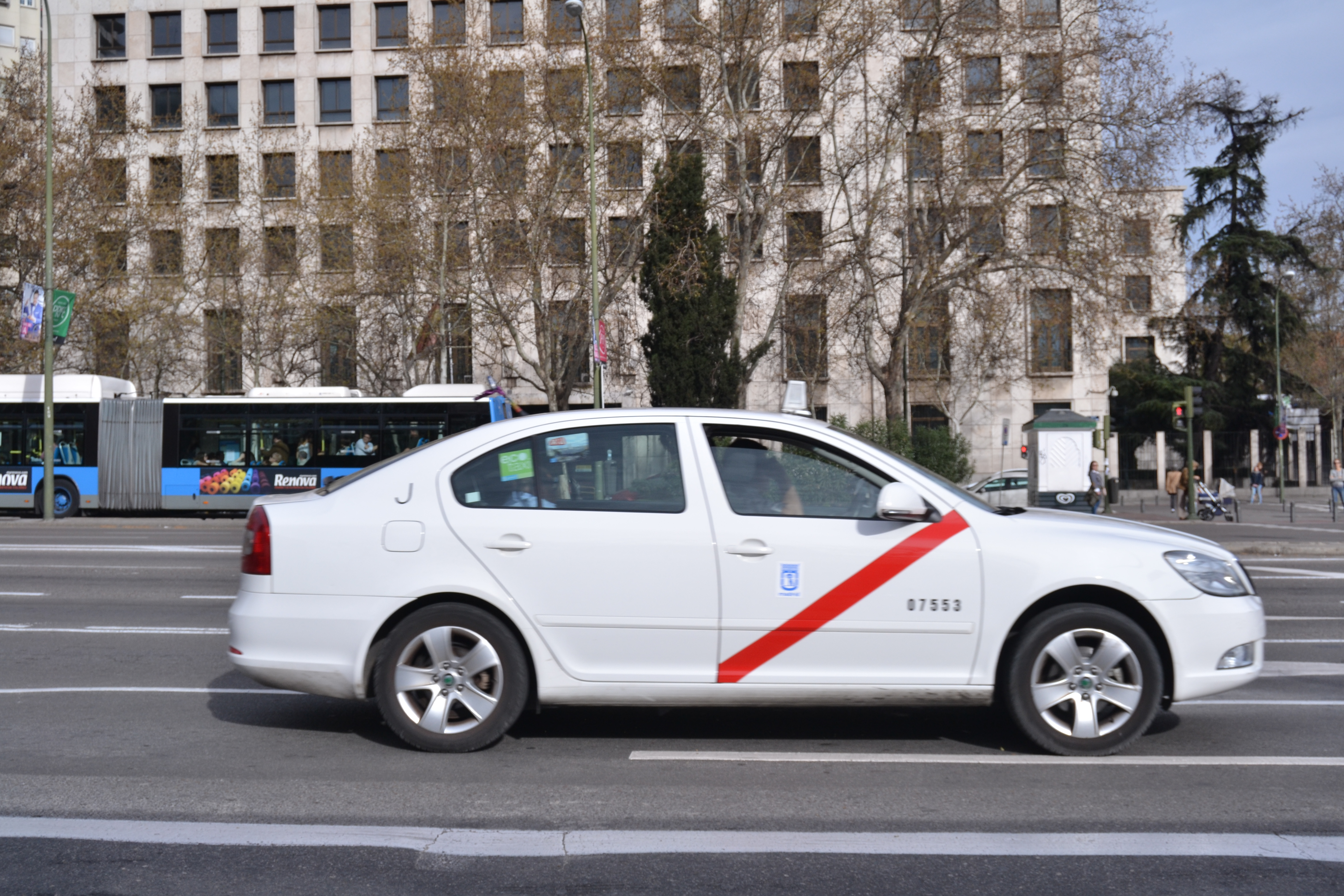 Una foto de un taxi en el Paseo de la Castellana en Madrid.